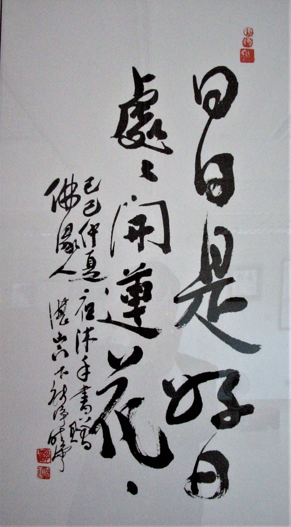 釋曉雲 法師3墨寶